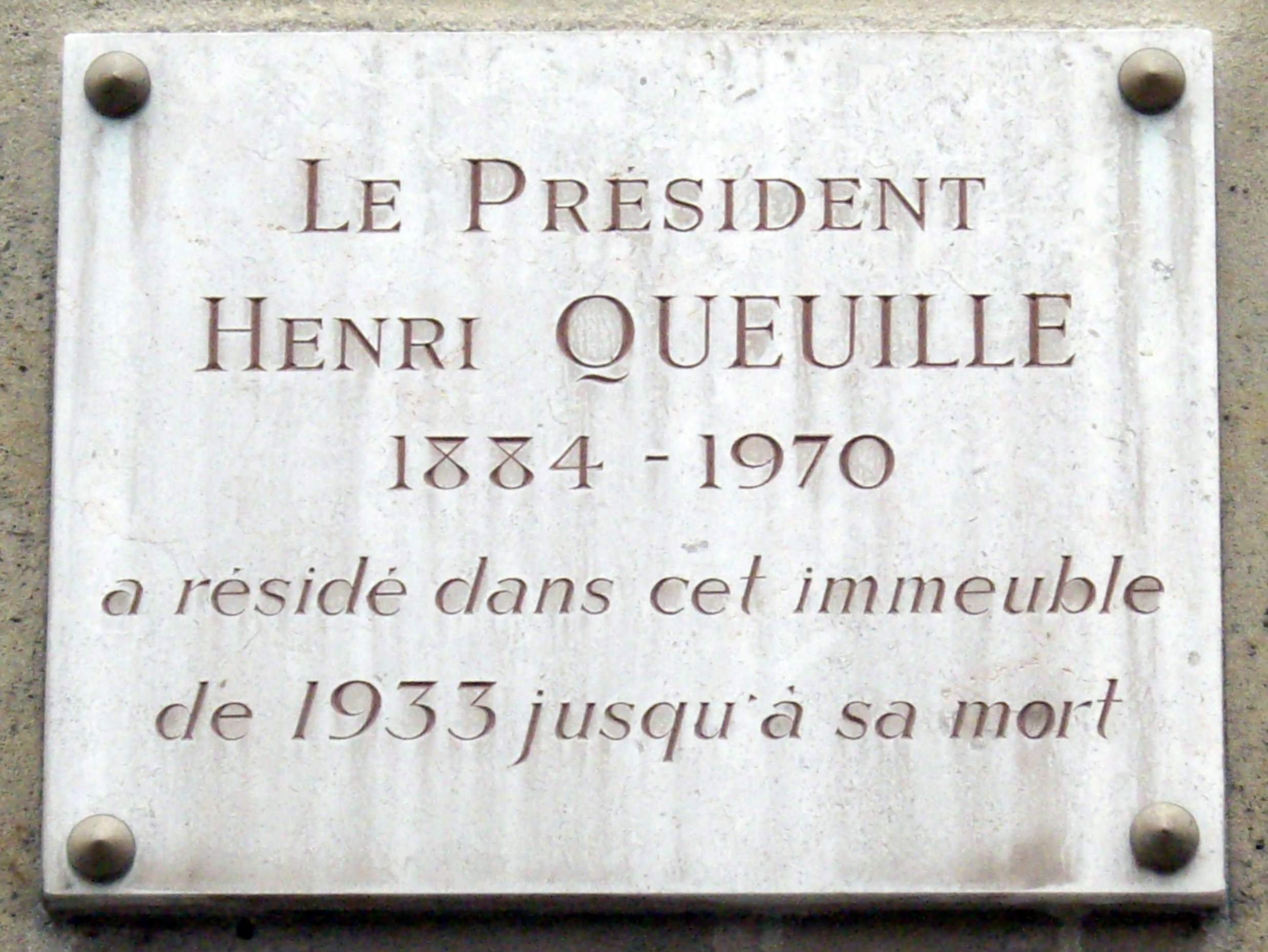 Plaque apposée au n° 100 de la rue du Cherche-Midi, Paris 6e, où résida le président du Conseil Henri Queuille (1884-1970) de 1933 à sa mort.